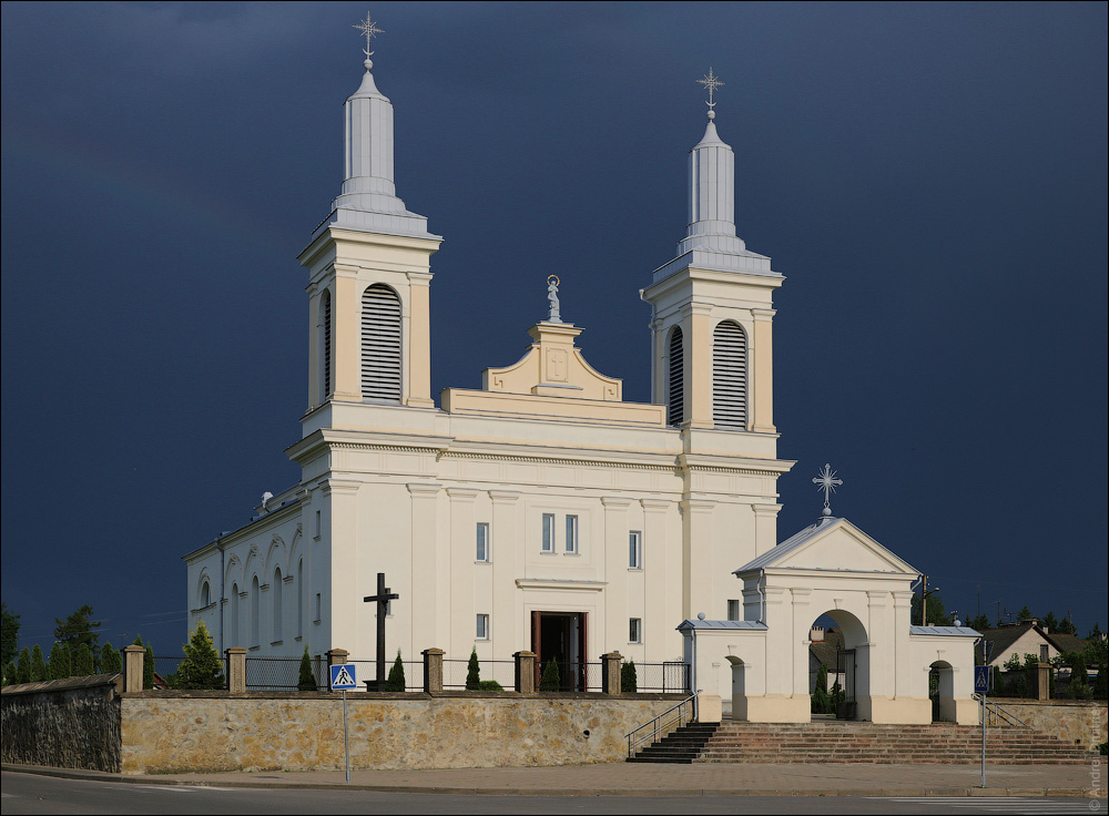 Касцёл Святога Вацлава. Ваўкавыск